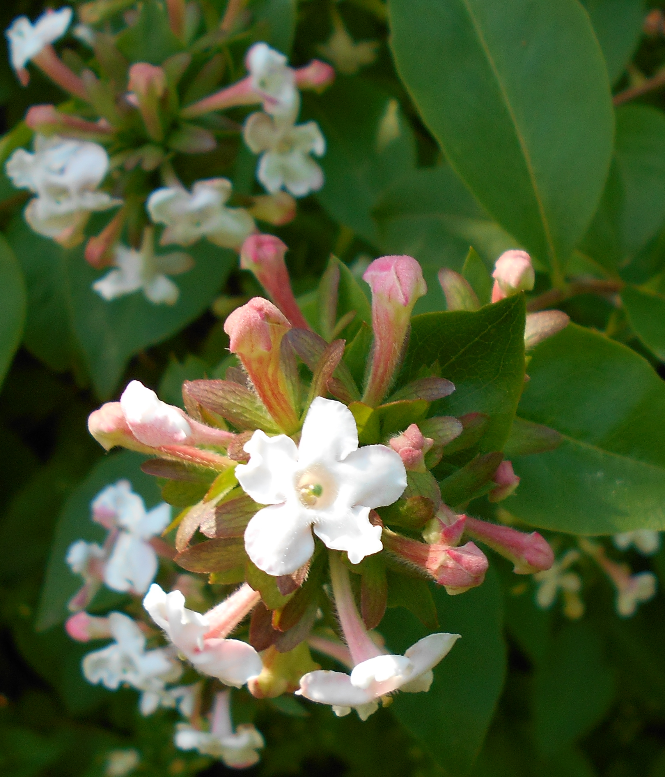 Abelia mosańska (Abelia mosanensis), Ogród Botaniczny UMCS w Lublinie